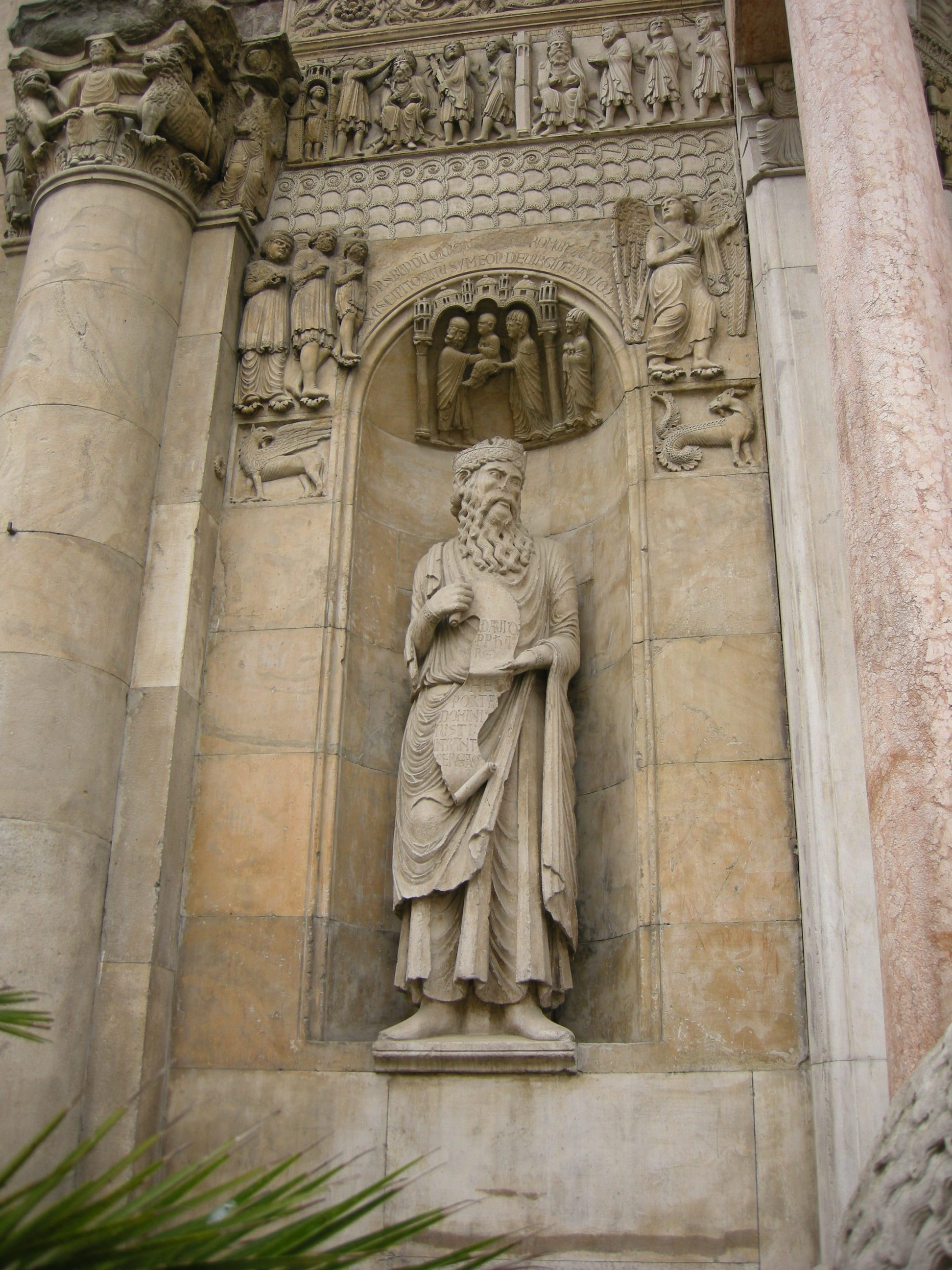 Duomo di fidenza, sculture a sx del portale c.le, re davide, attr. benedetto antelami